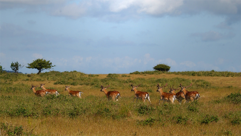 Dådyr på Romsø